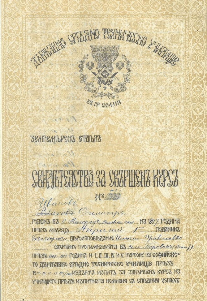 Свидетелство за завършено Софийското държавно средно техническо училище през 1915 г.